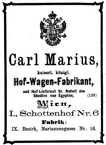 Annonce des Wagen-Fabrikanten Carl Marius, Wien. in: Sportblatt 6. Jänner 1877